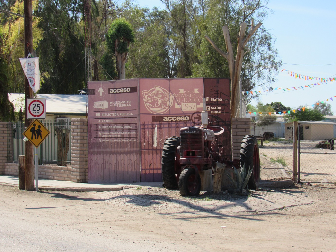 Al centro de Michoacán de Ocampo, B. C. se encuentra este acceso a un auditorio, al salon ejidal